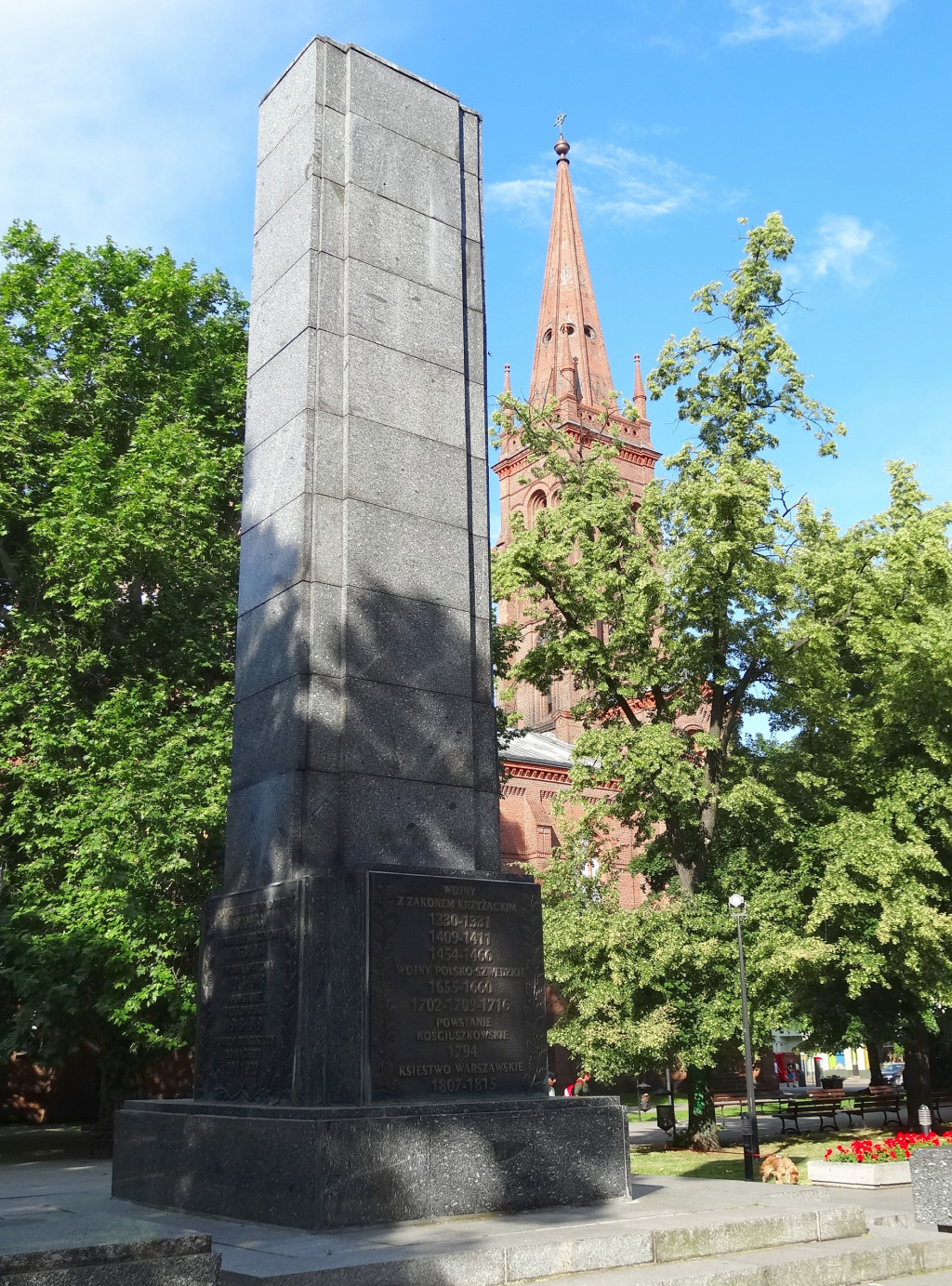 Pomnik Wolności w Bydgoszczy (1945, Jan Kossowski) zlokalizowany na placu Wolności